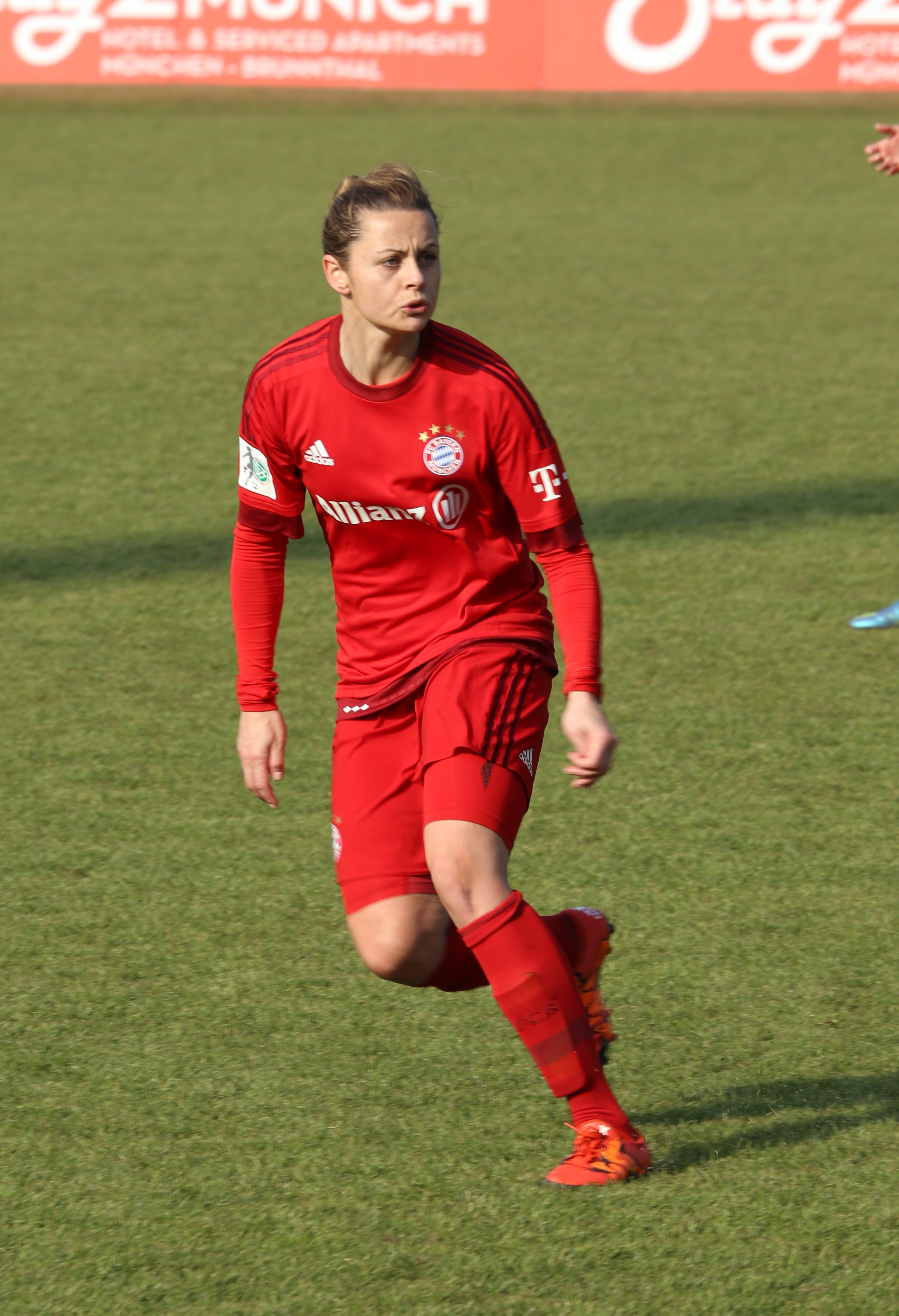 Nora Holstad Berge (FC Bayern München) beim Frauen-Bundesliga-Spiel FC Bayern München gegen FF USV Jena am 19. März 2016 im Stadion an der Grünwalder Straße (Ergebnis war 5:1).